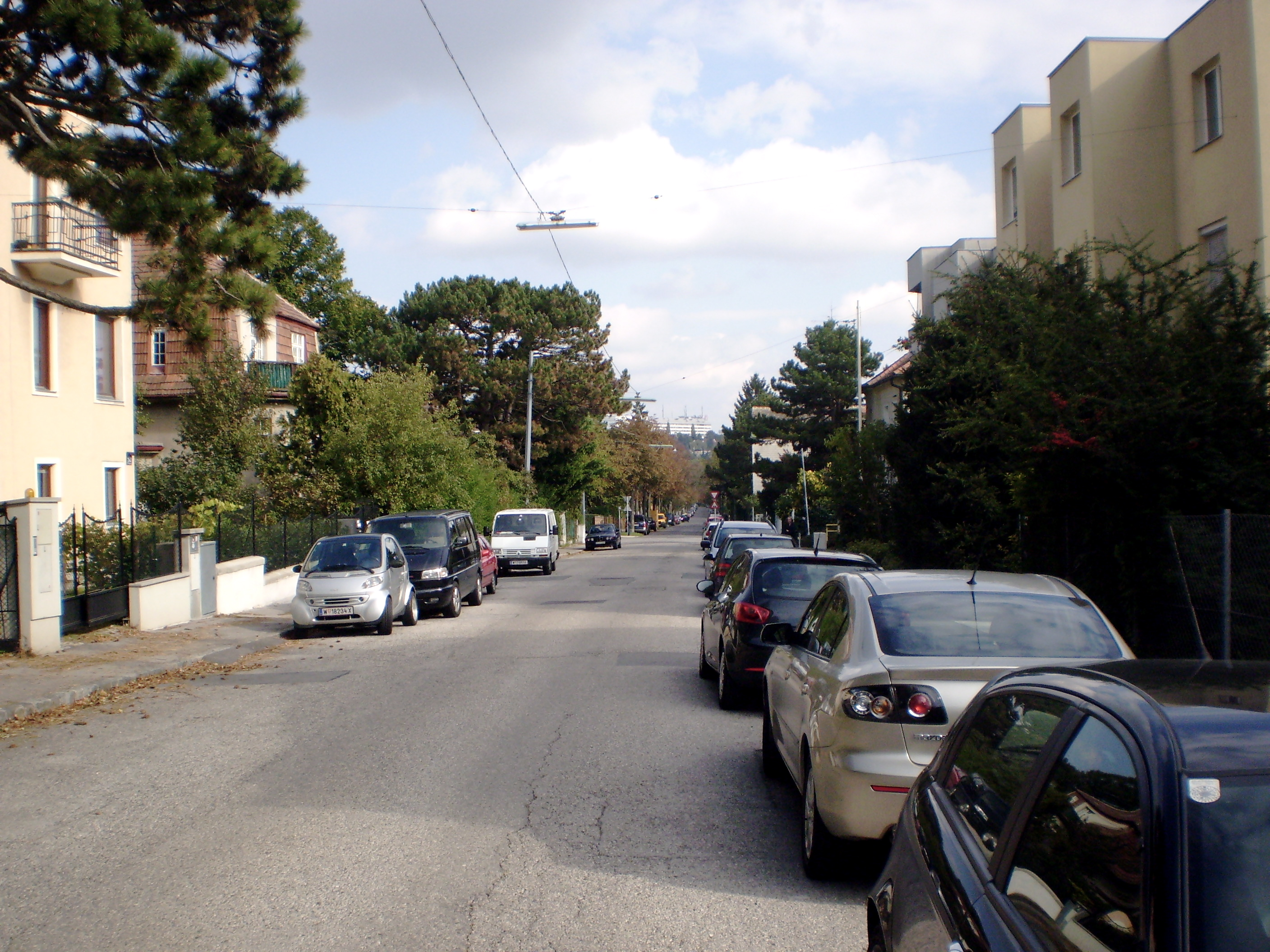 Gobergasse im 13. Wiener Gemeindebezirk Hietzing, Blick Richtung Osten, im Hintergrund das ORF-Zentrum am Küniglberg.